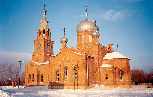 Фото церкви в селе Краснохолм